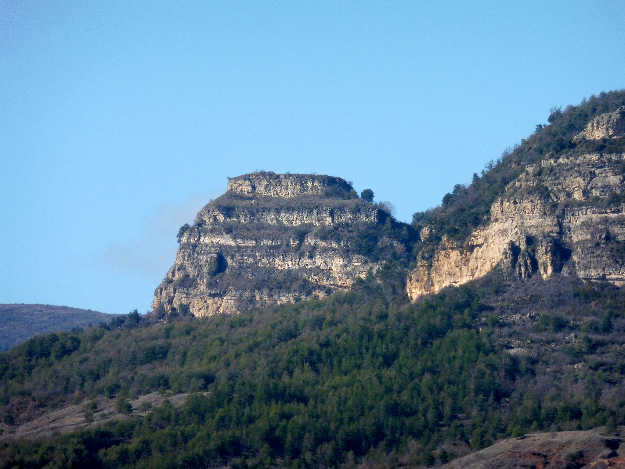 Castell de Toló (Gavet de la Conca): turó on hi ha el castell